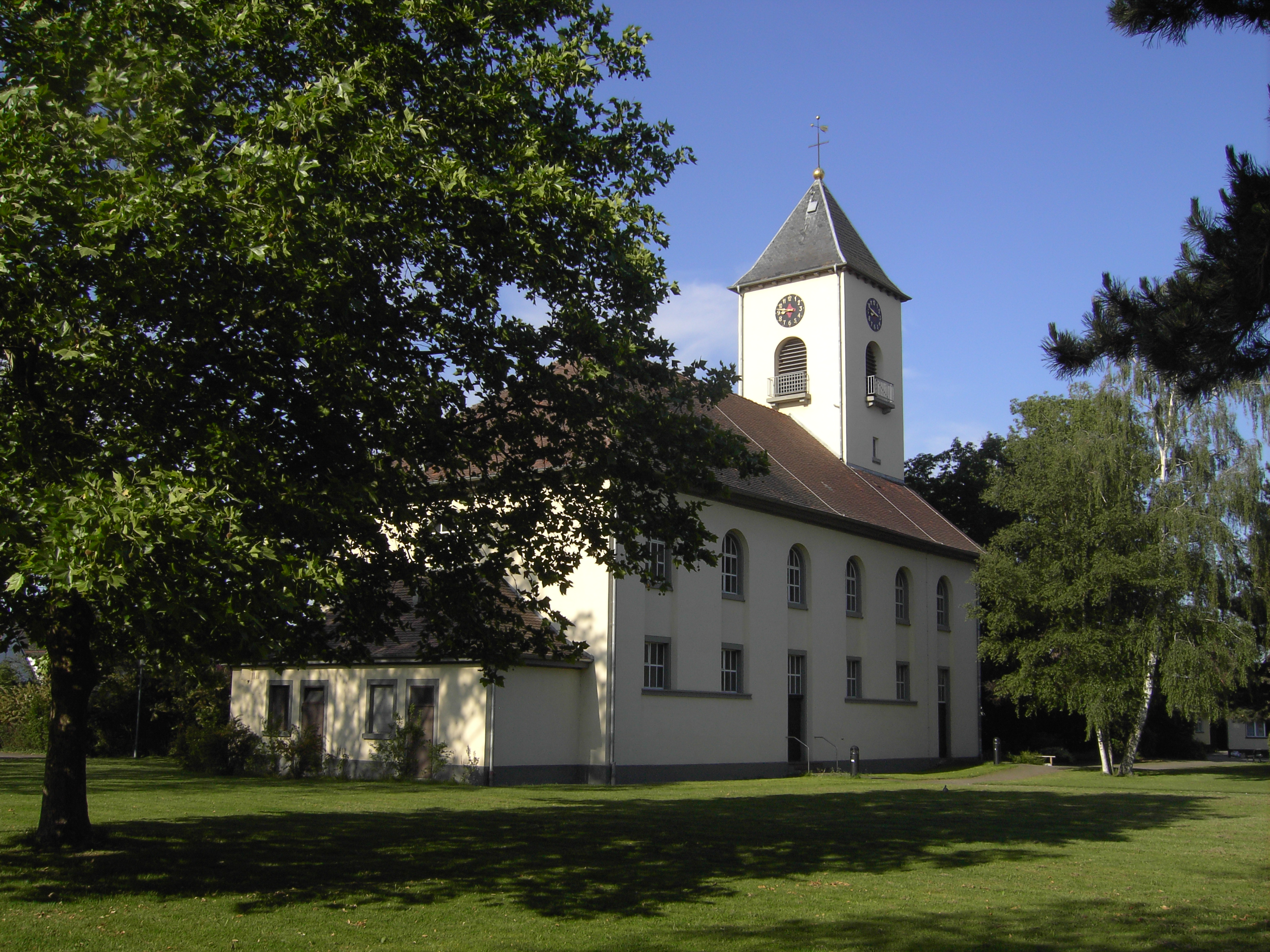 Stutensee-Friedrichstal Evangelische Kirche/Protestant church